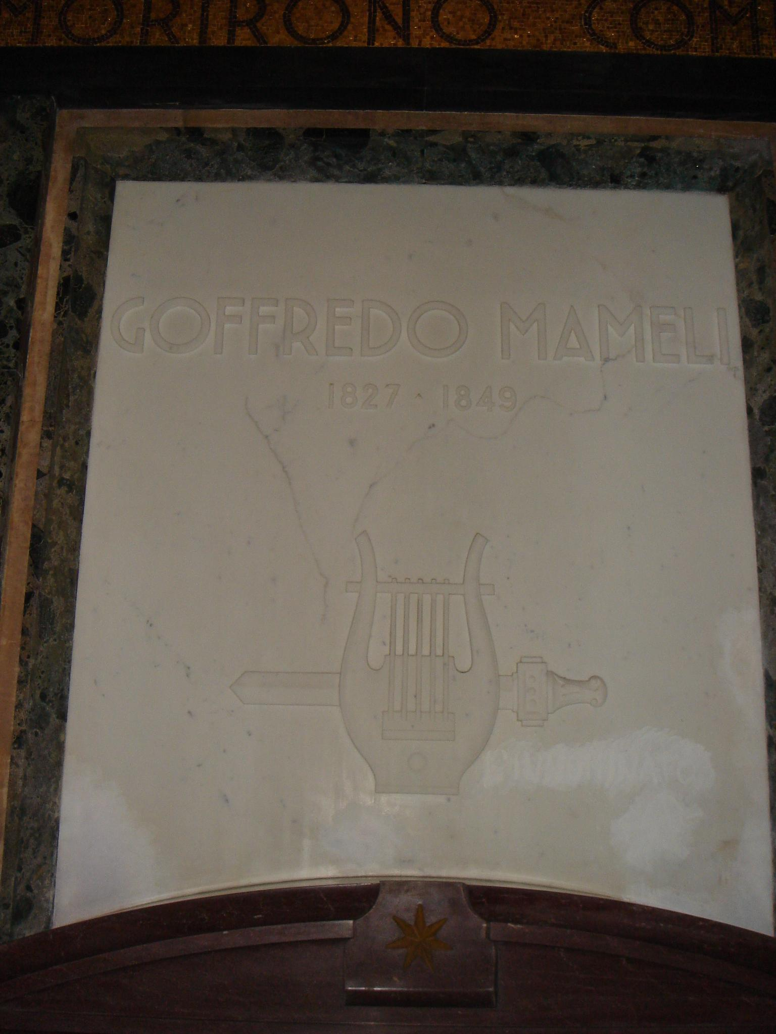 Roma, monumento al sacrario dei caduti per Roma 1849-1870 a via Garibaldi, al Gianicolo: lapide sulla tomba di Goffredo Mameli